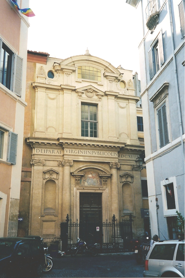 Chiesa di Santa Maria in Publicolis, Roma. Facciata di Giovanni Antonio de Rossi. Picture by Torvindus.